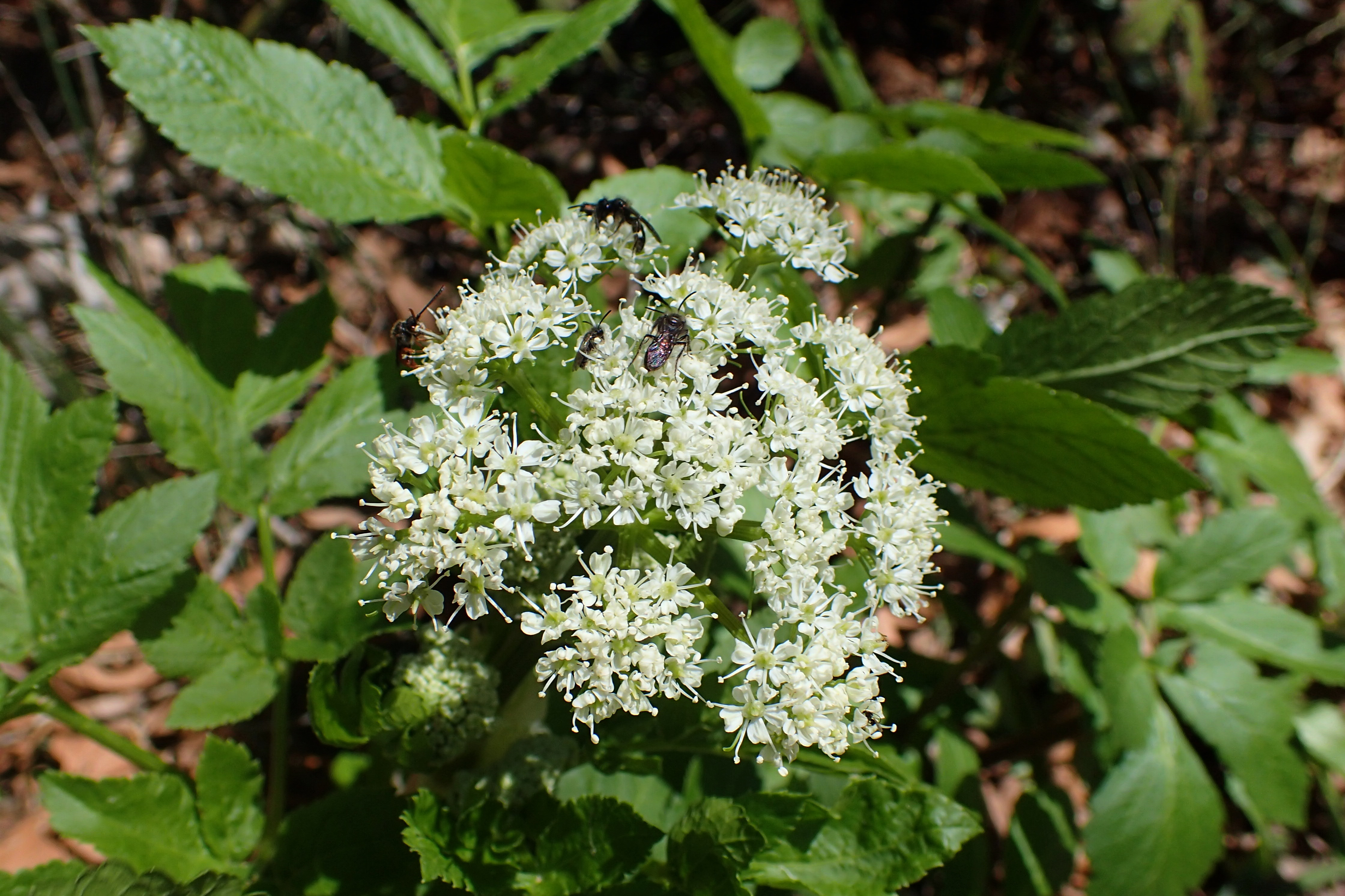 Lecokia cretica at Caledonia Waterfall, Cyprus